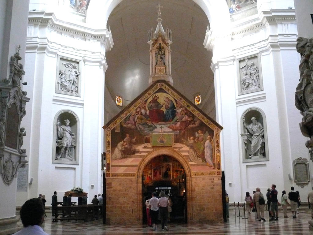 Portiuncola in Santa Maria degli Angeli